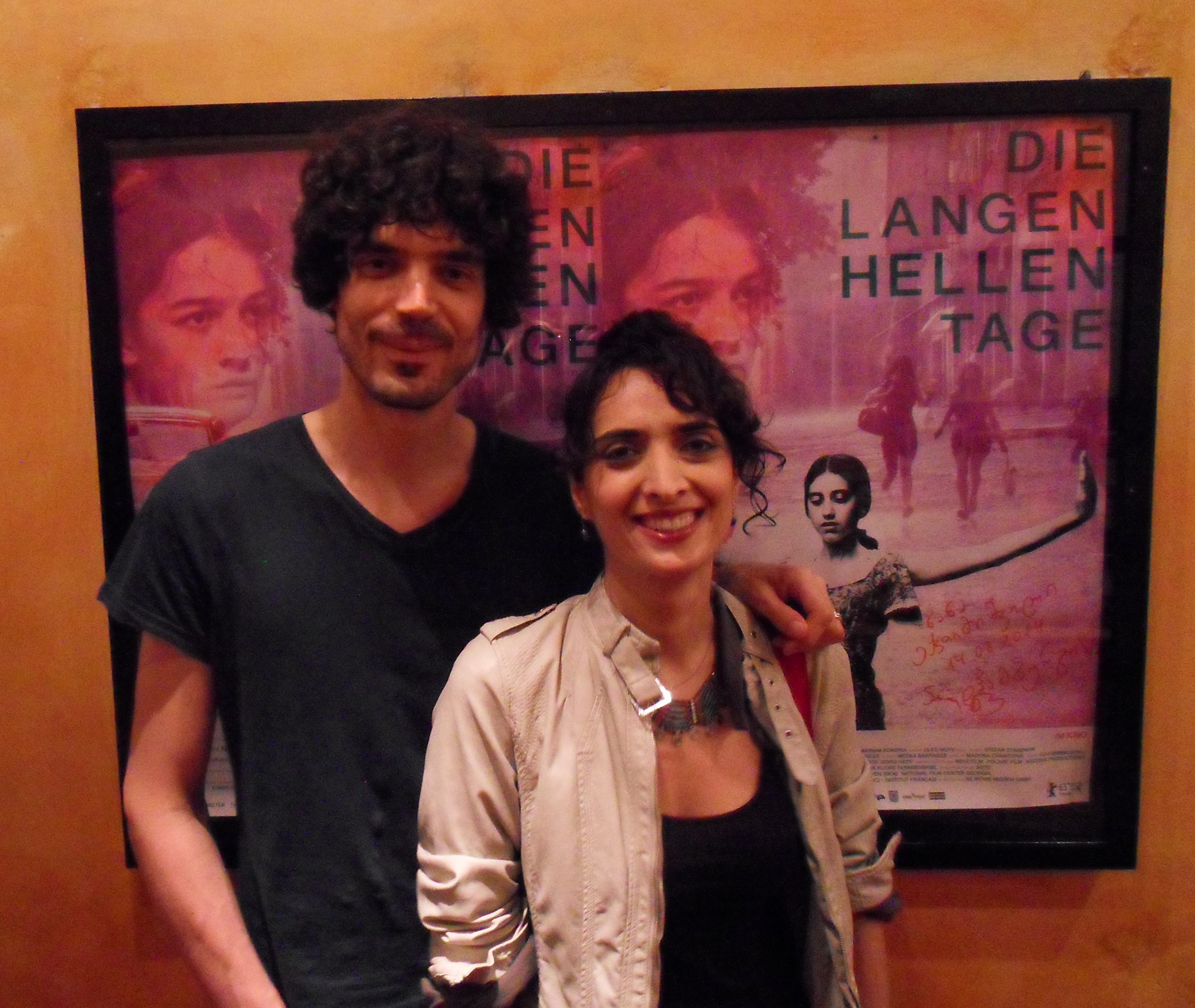 Nana Ekvtimishvili und Simon Groß nach der Vorführung des Films "Die langen hellen Tage" im Hamburger Abaton-Kino am 14. August 2014.